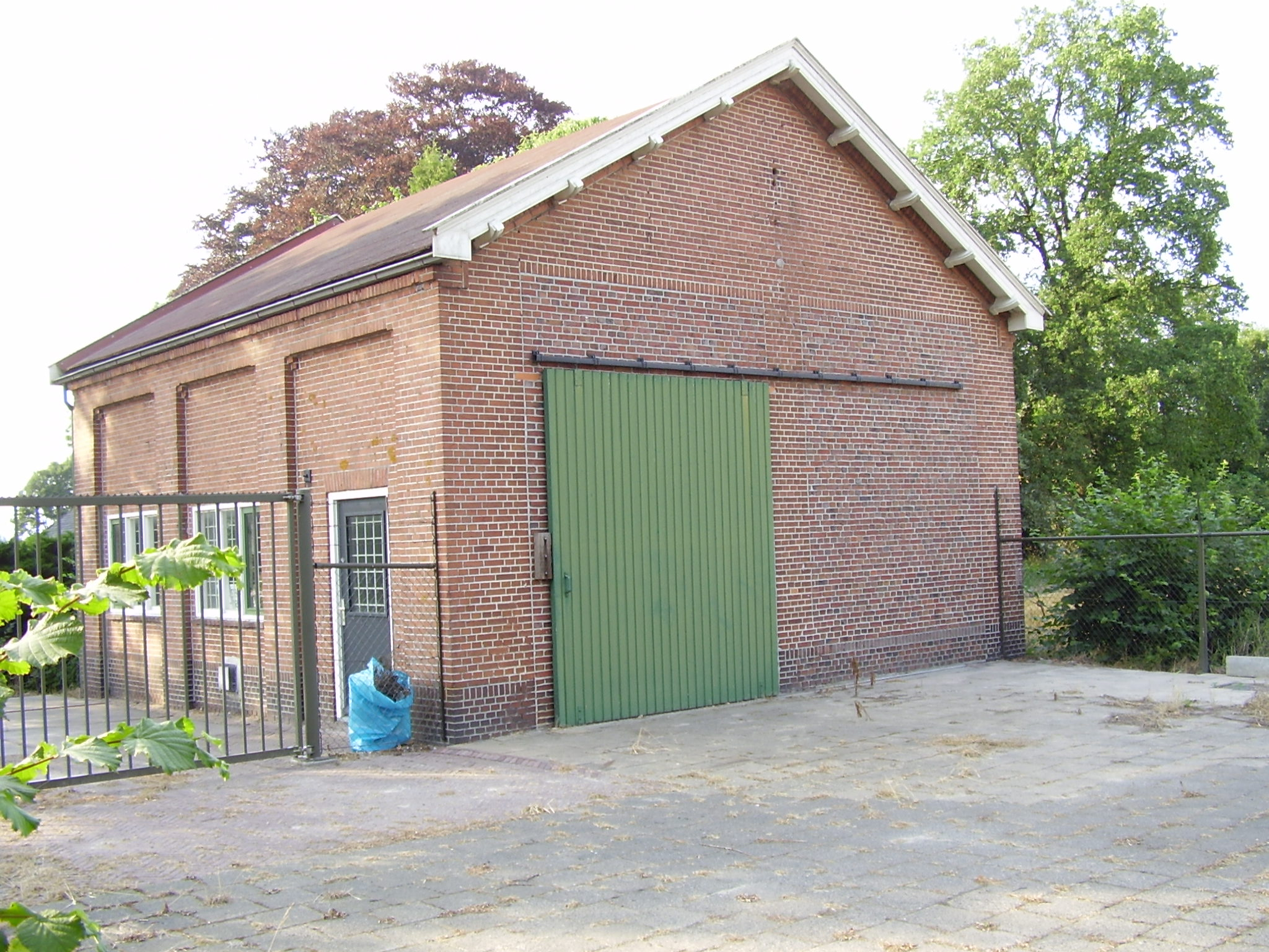 De voormailge remise van de OG aan de Oudeschanskerweg in Bellingwolde. Het is in de loop van de tijd verbouwd, de raampartijen zijn gewijzigd en de grote deuren verwijderd, maar het is toch nog goed herkenbaar.